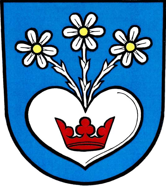 Znak obce Velké Kunětice